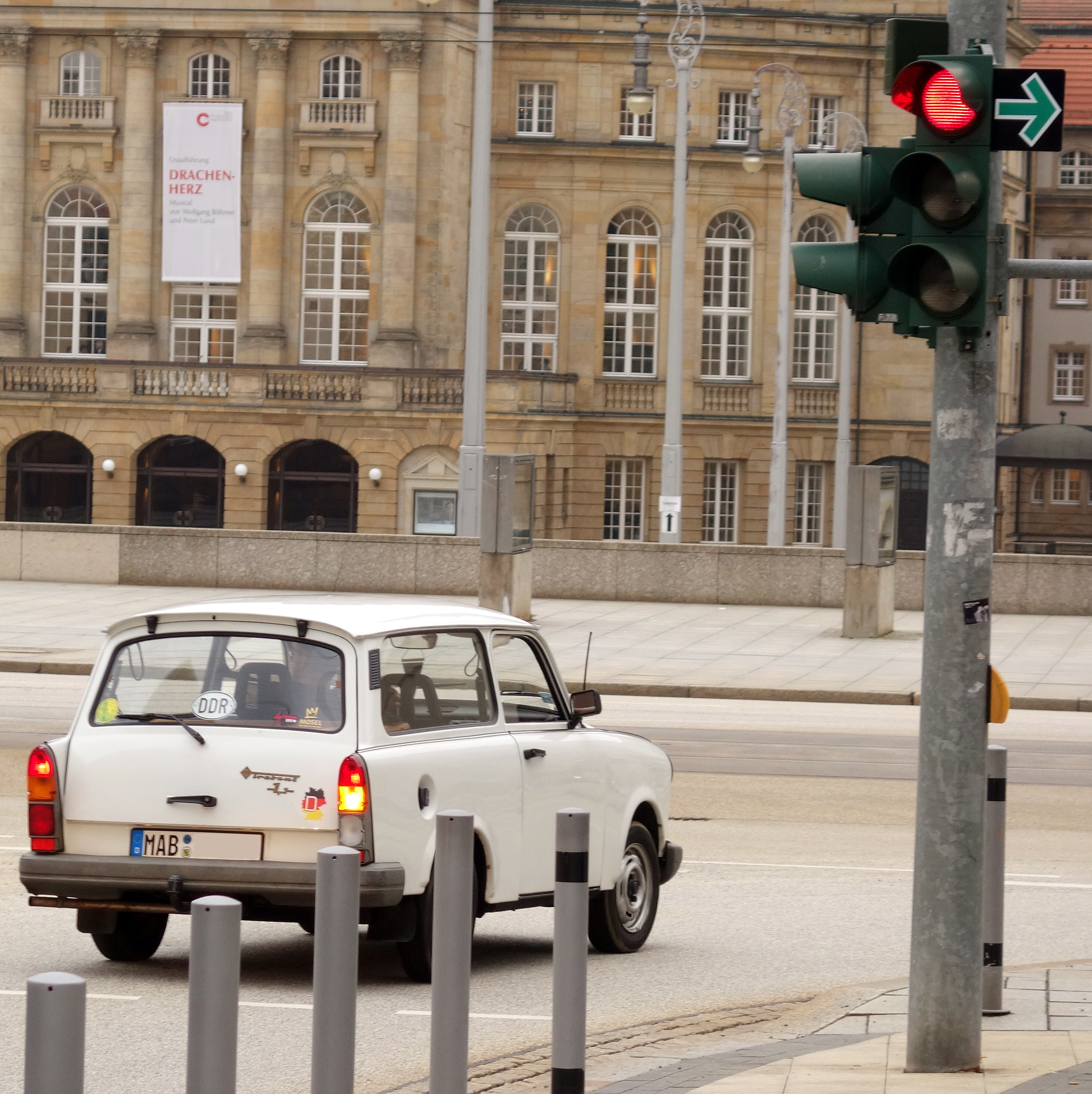 Trotz roter Ampel darf der Trabi rechts abbiegen (gesehen in Chemnitz, 31.03.2019)